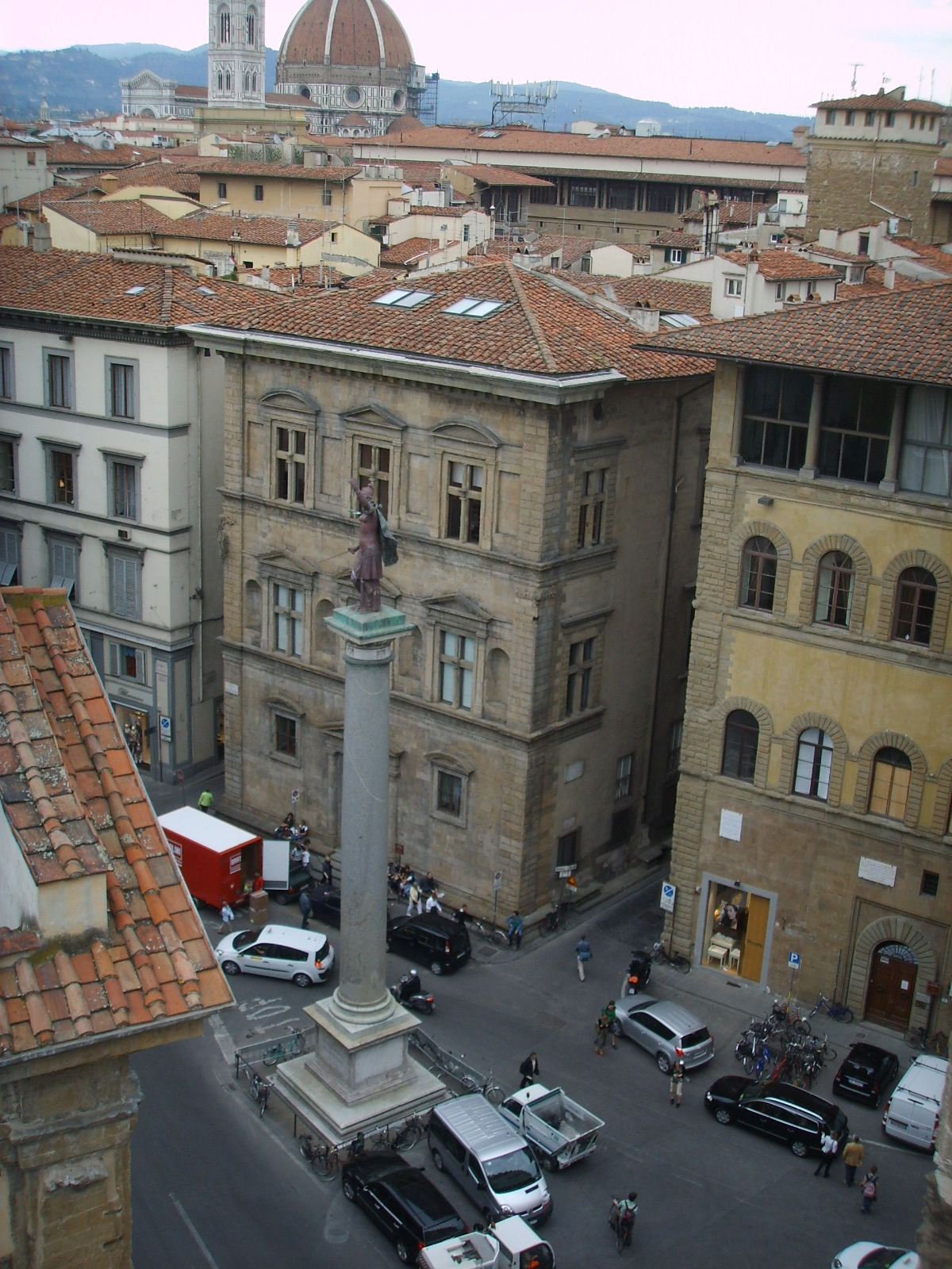 Torre dei gianfigliazzi, veduta, piazza santa trinita e colonna della giustizia